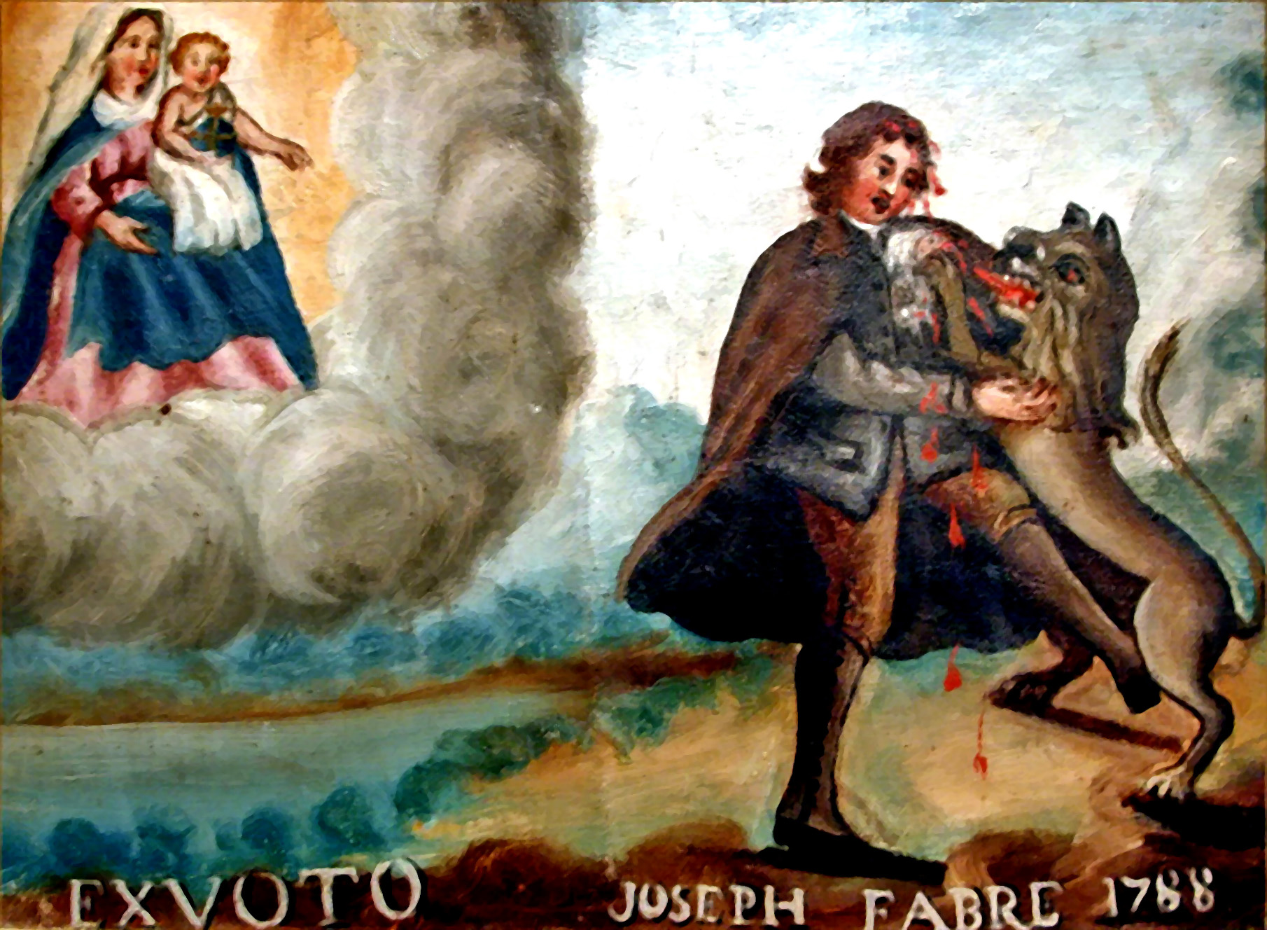 Ex voto